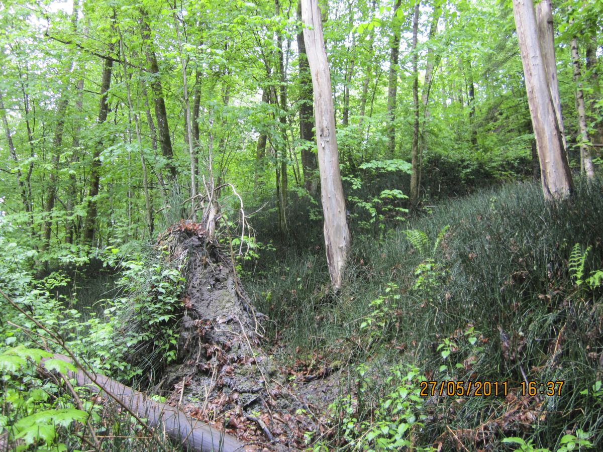 Det blågrønne skavgresset dekker skogbunnen i snelle- askeskogen.